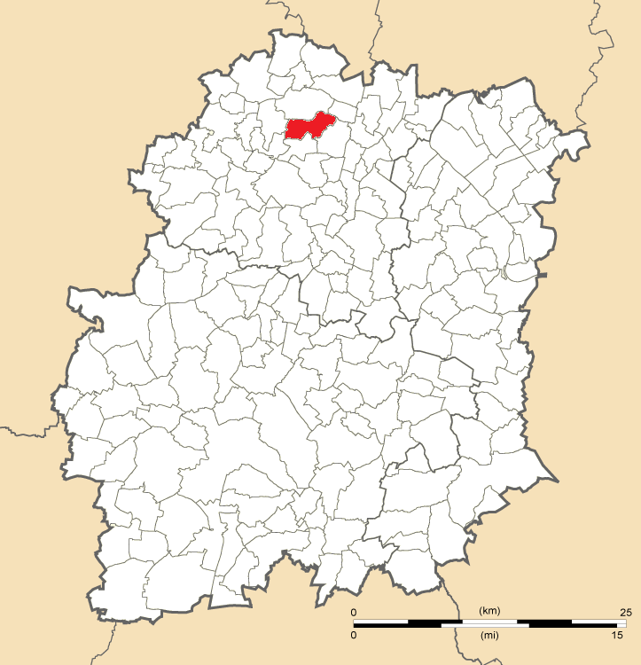 Carte de positionnement de Villebon-sur-Yvette dans le département de l'Essonne